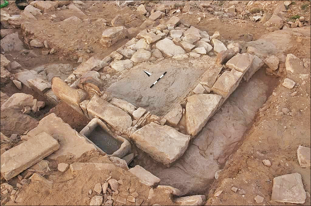 Thermes de Biyarah. Grand bain avec un bassin à coté.